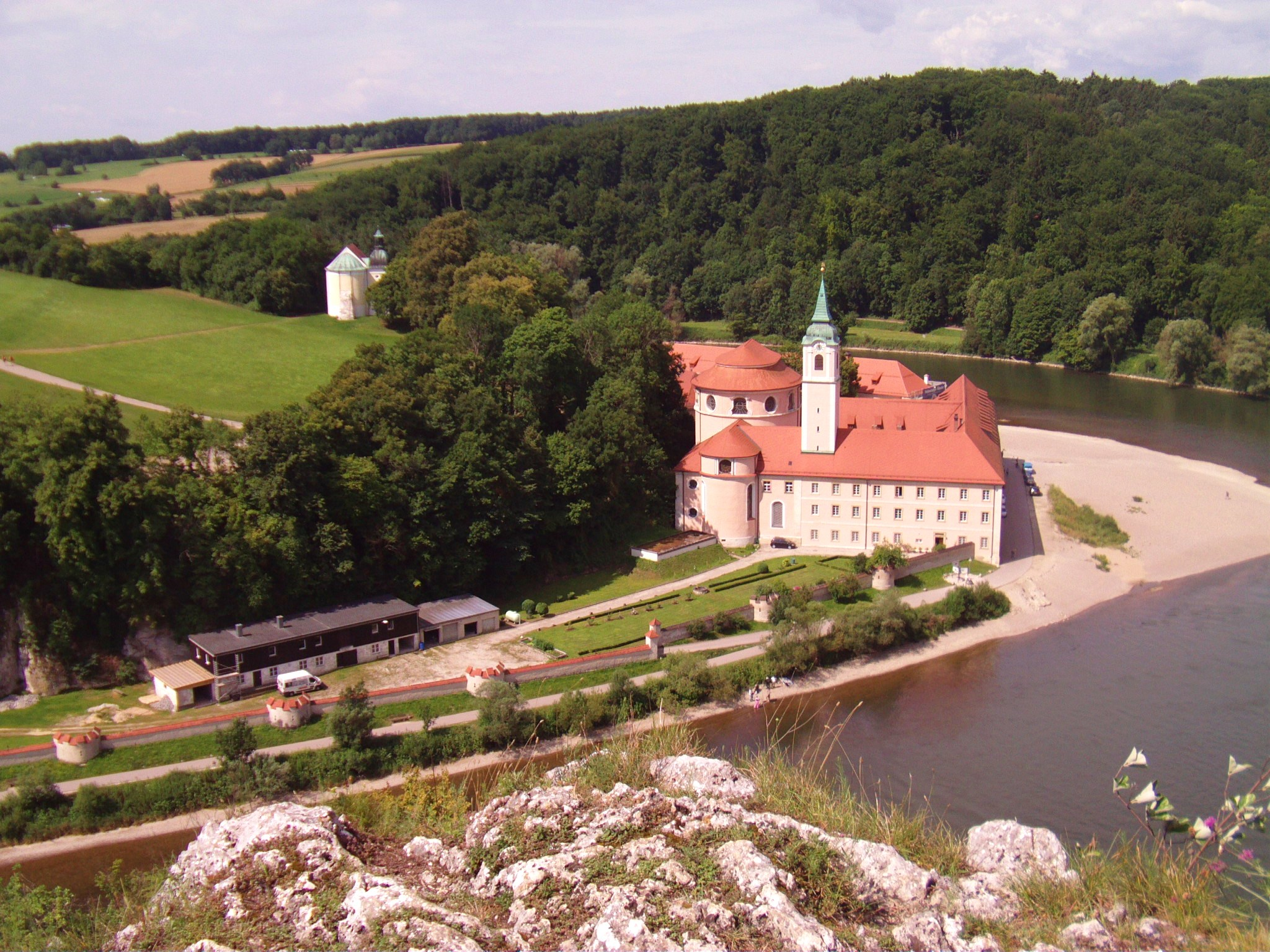 Kloster Weltenburg in Kelheim 2012